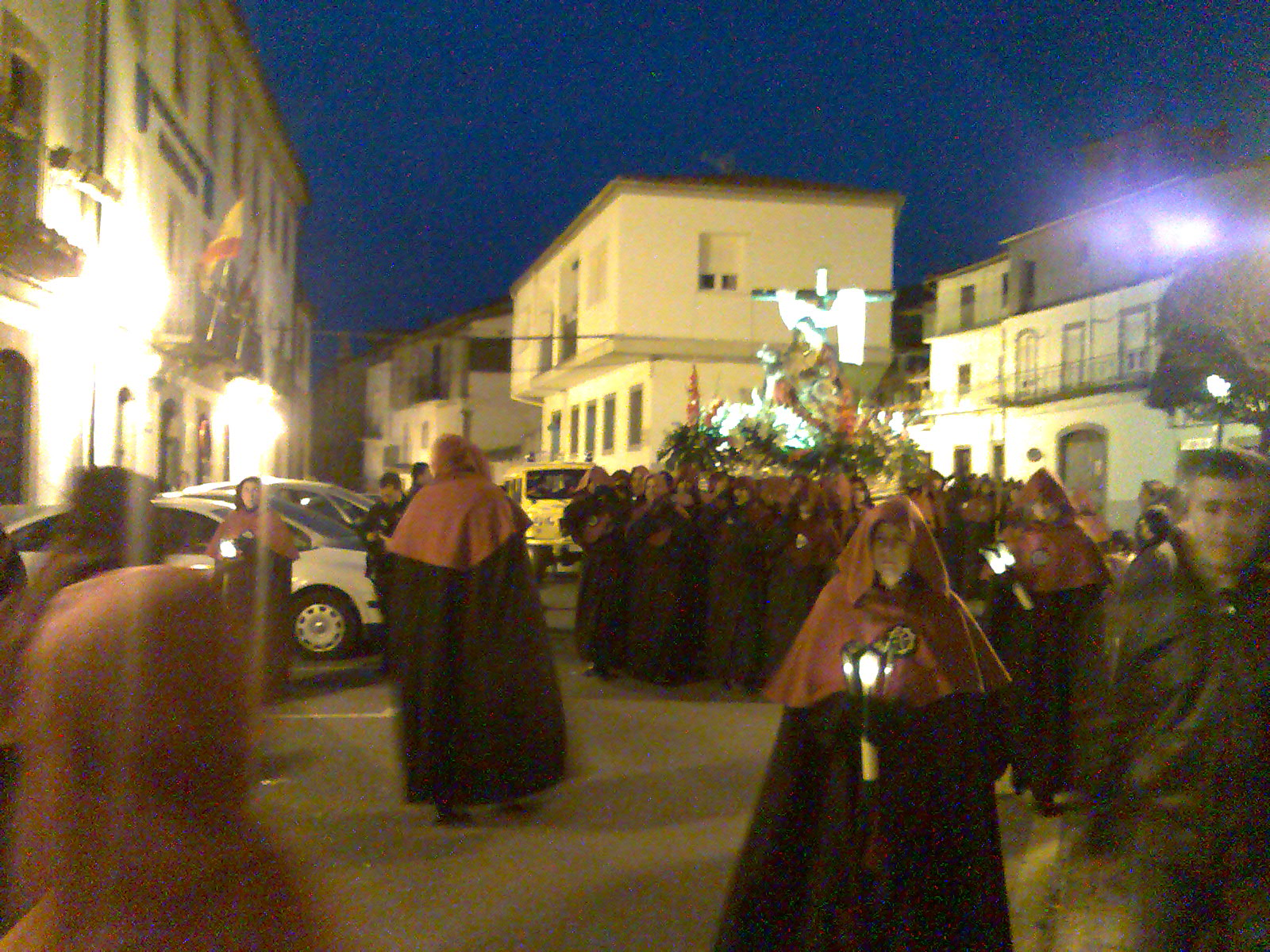 Procesión de Jueves Santo, de Nuestra Señora de las Angustias